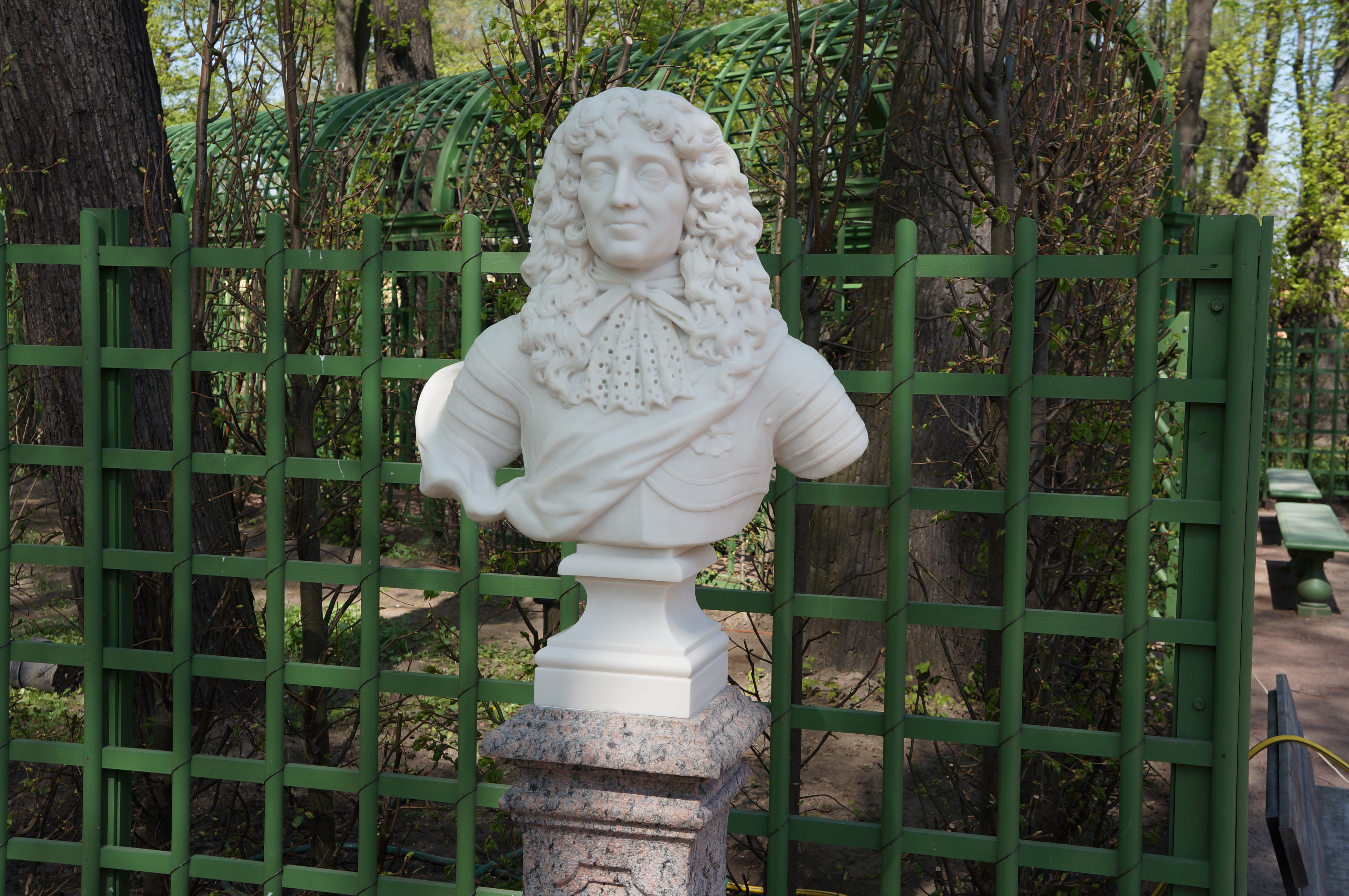 Бюст "Герцог Бранденбургский" (Копия из искусственного мрамора) 2011 г.